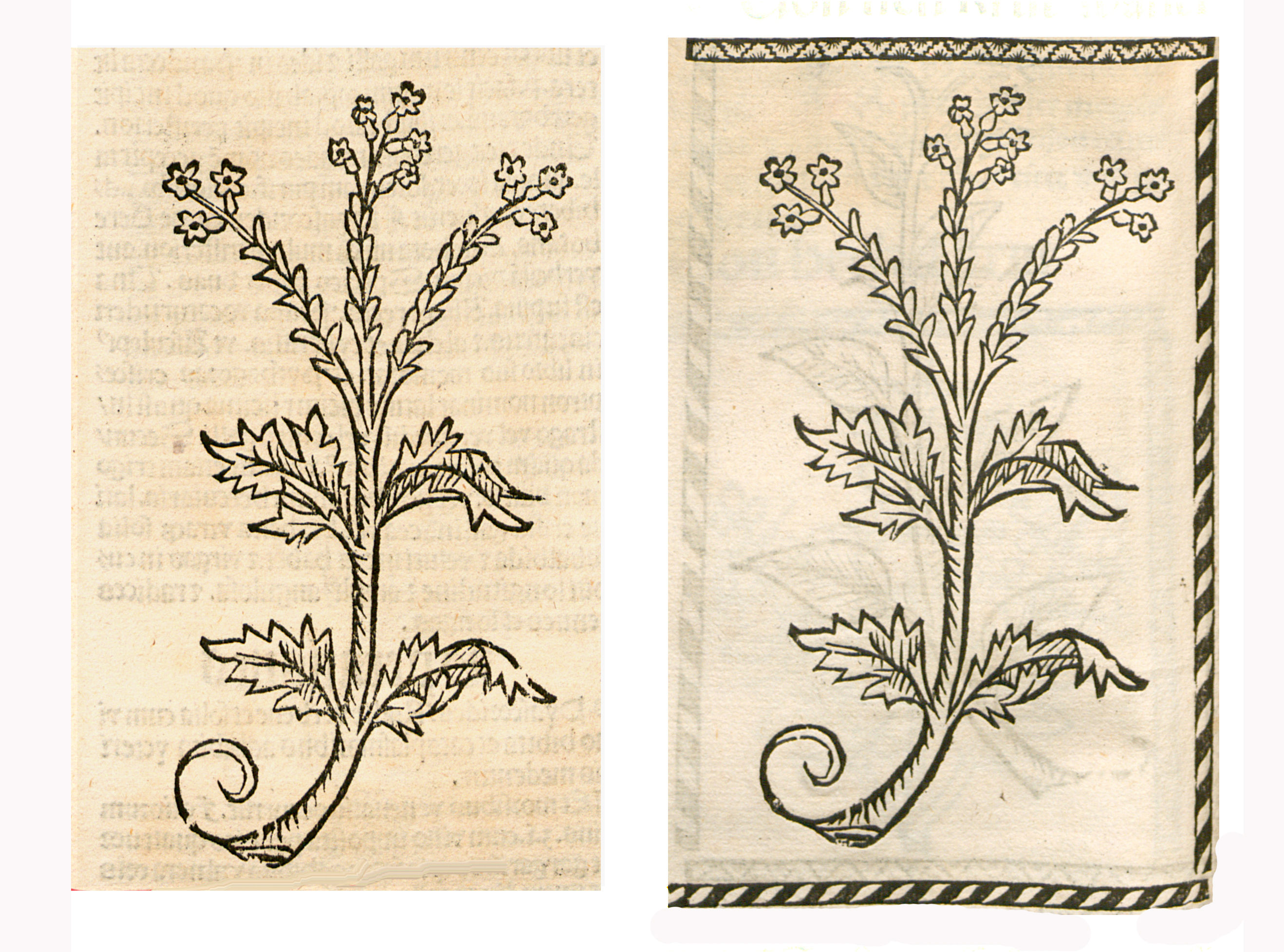 Abbildung von: Isen krut (Verbena officinalis)